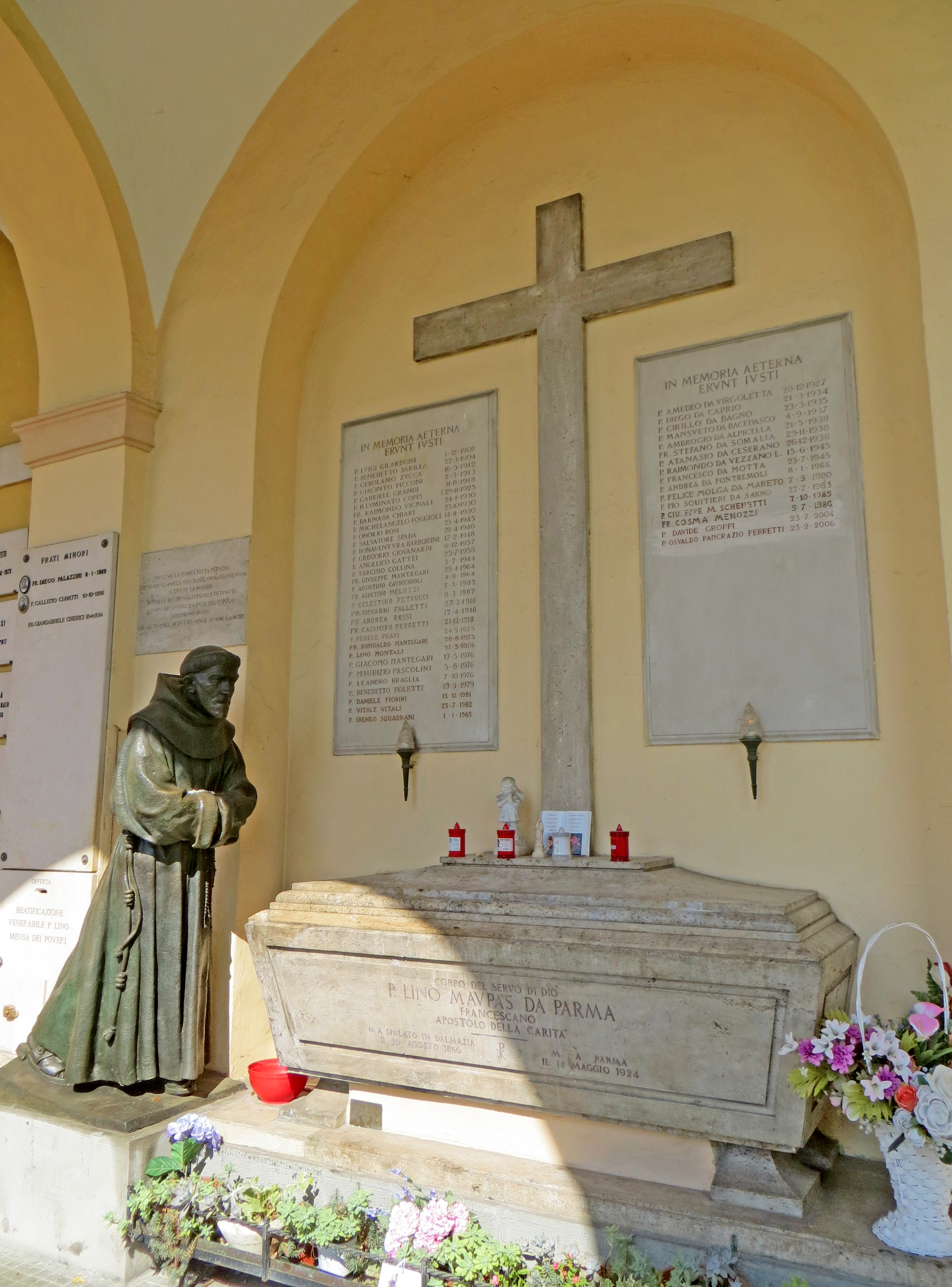 Cimitero della Villetta (Parma) - tomba di padre Lino